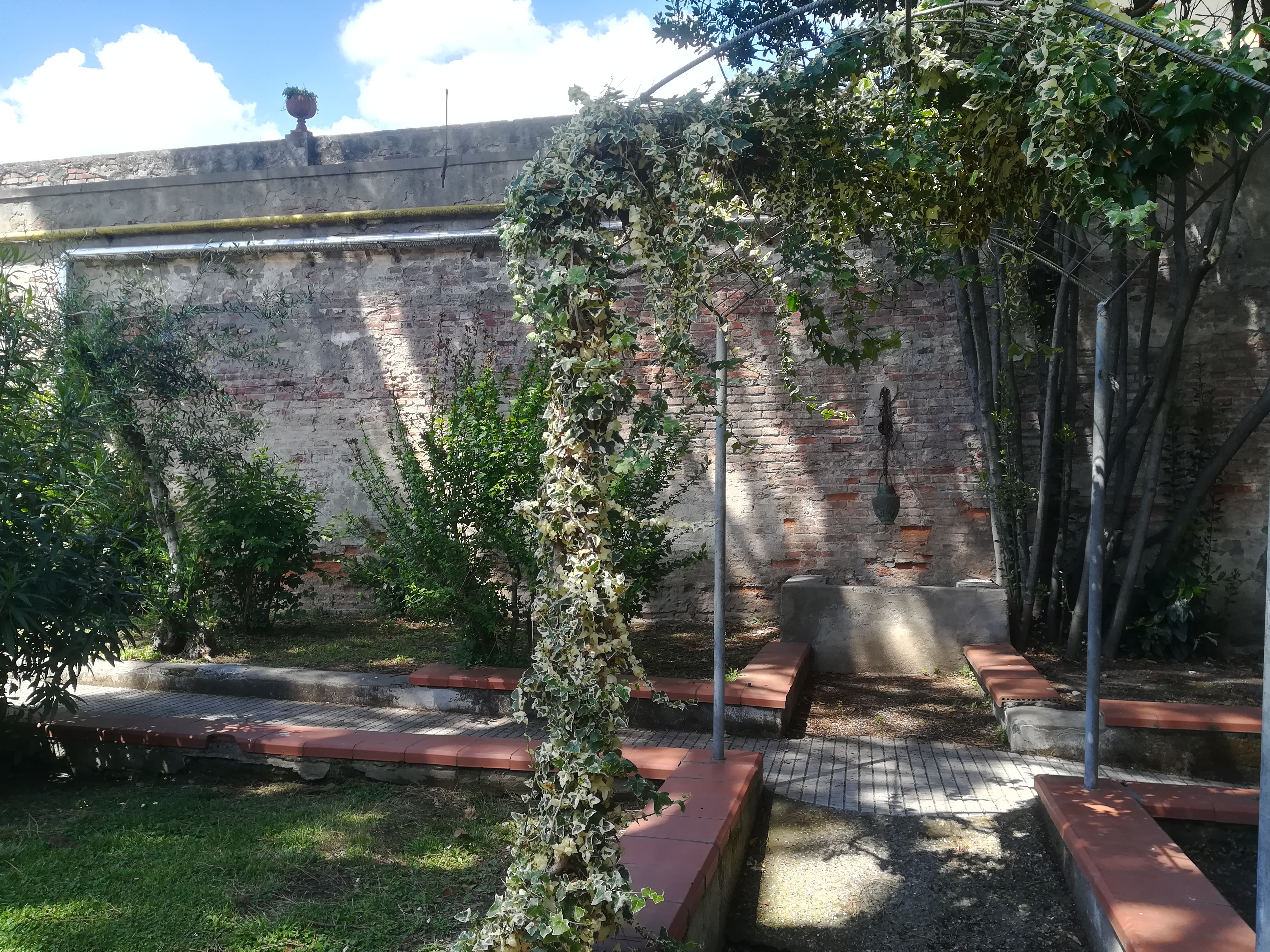 La parte più antica del giardino del Conservatorio SS.ma Annunziata. Dietro possiamo vedere le mura di Empoli.